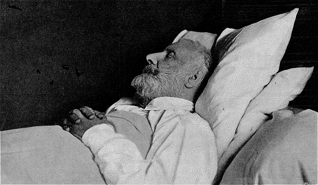 L'Illustration